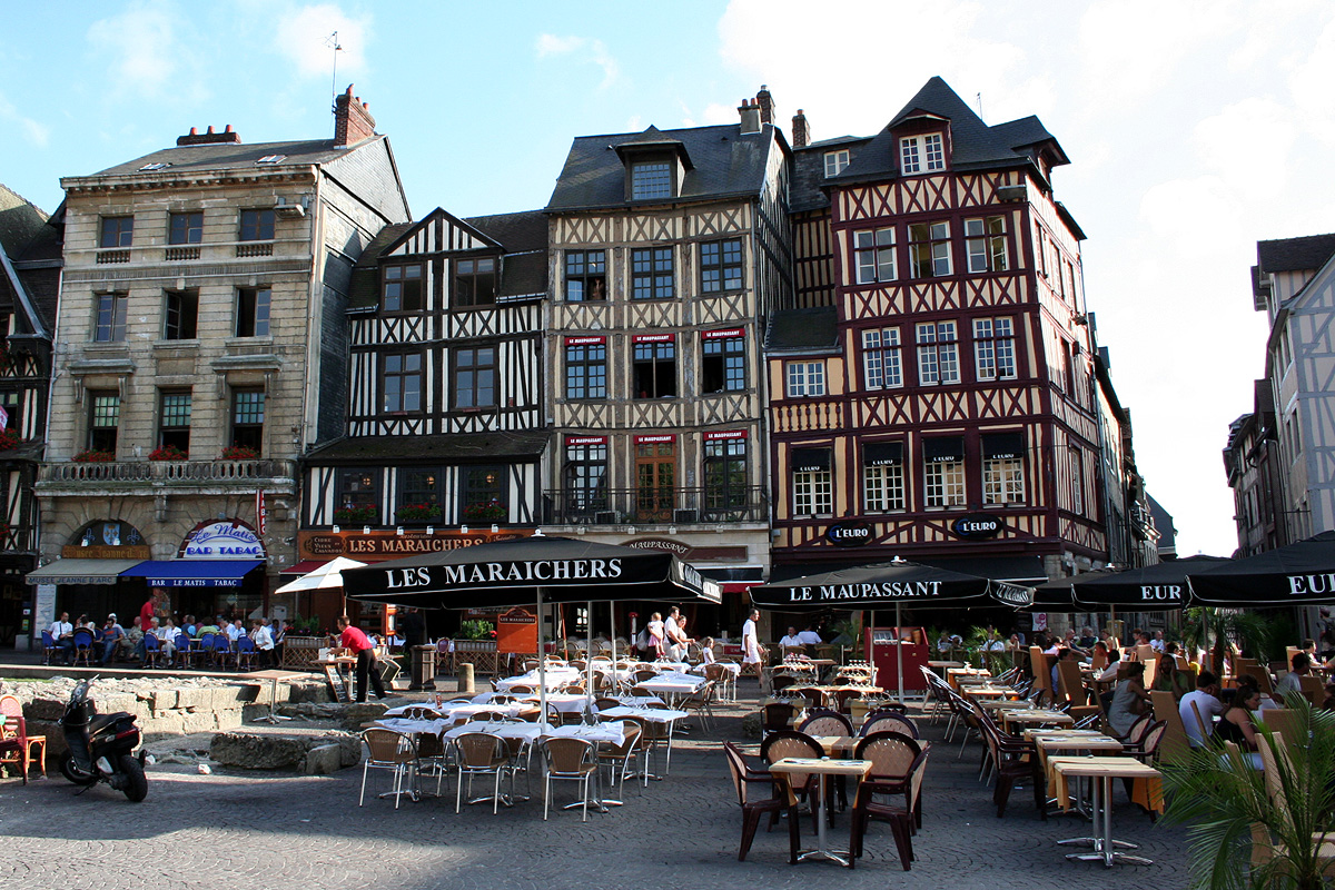 Place du vieux marché, Rouen, France